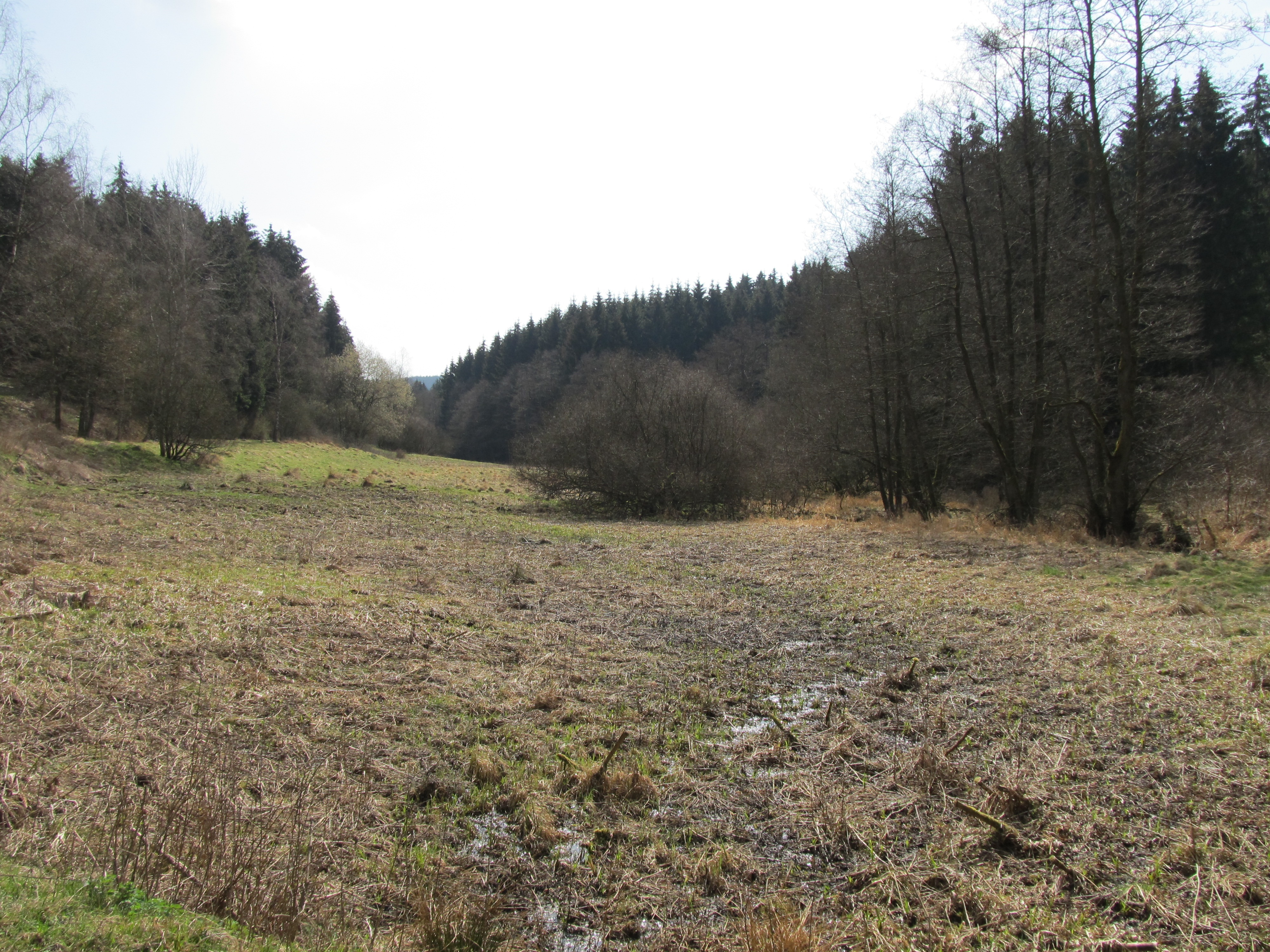 Das Tal des Wiebelhäuser Bachs zwischen Wilnsdorf, Wilden und Gilsbach im Kreis Siegen-Wittgenstein, Nordrhein-Westfalen.